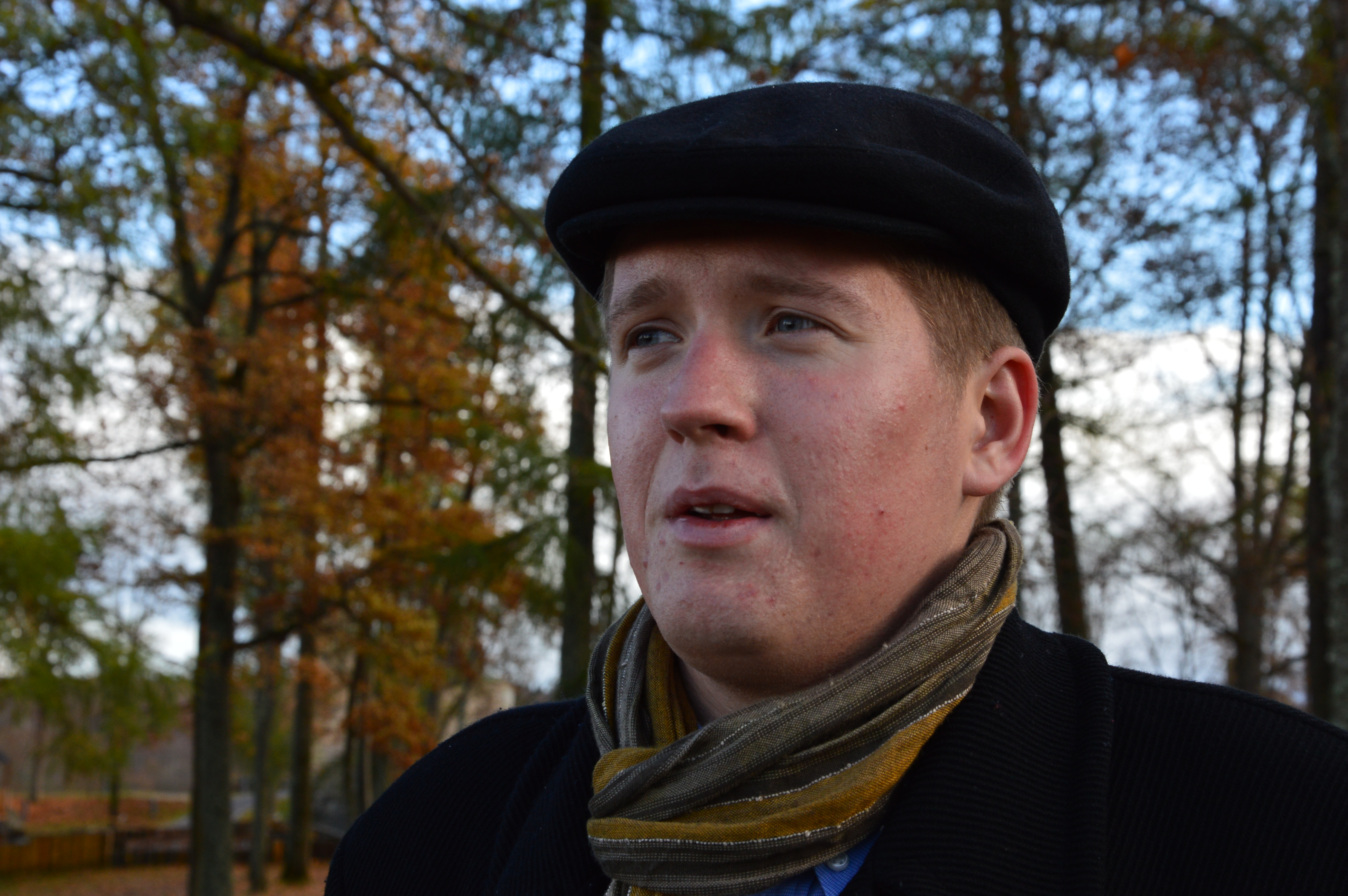 Ründo Mülts Paide Vallimäel